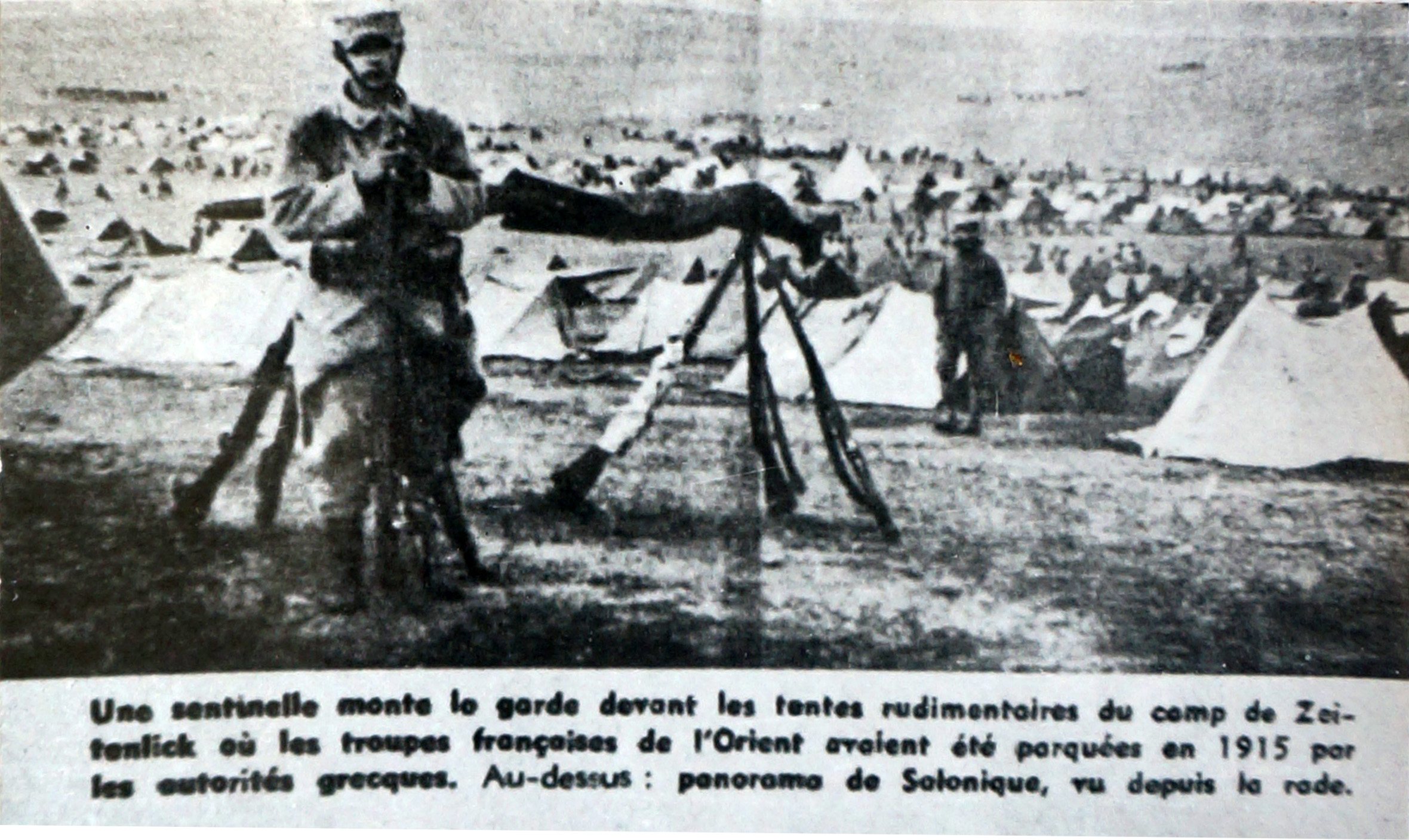 chapelle mémoriale dans l'enceinte du cimetière de Zeitenlik.